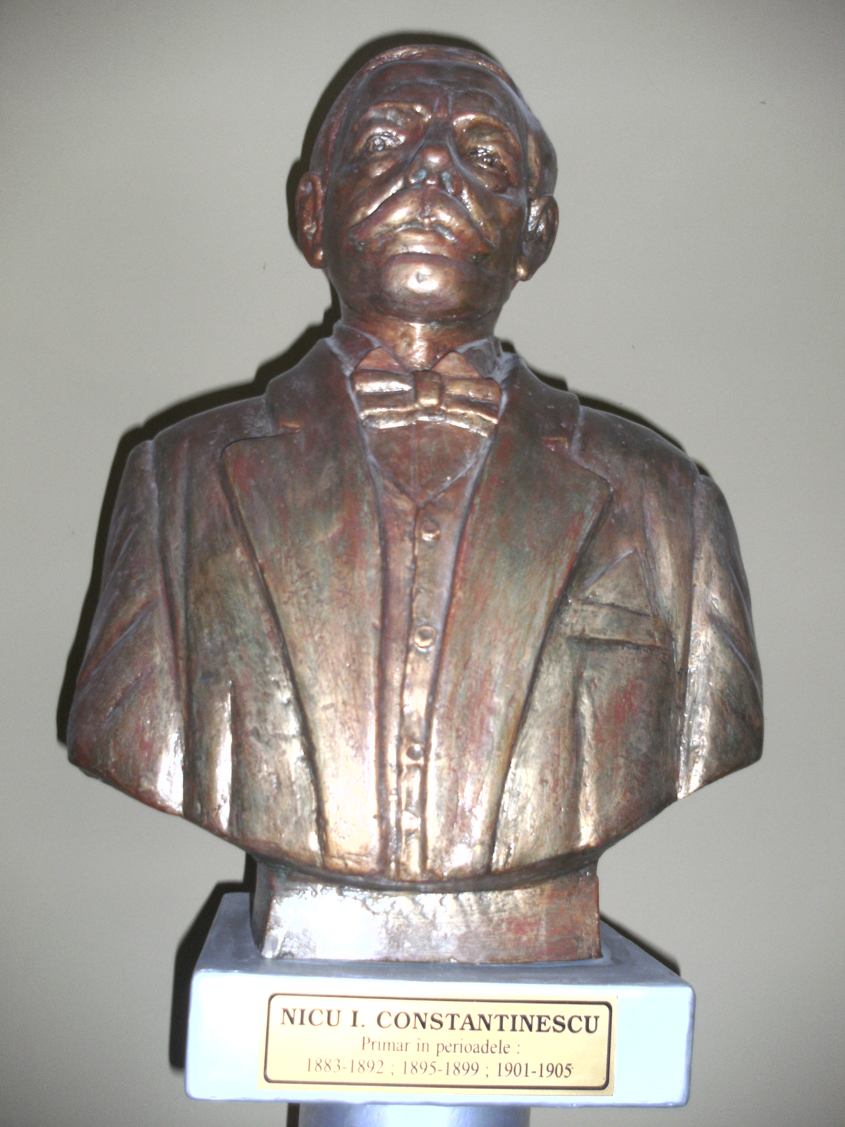 Bustul domnului Nicu Constantinescu, politician român de orientare liberală, primar al orașului Buzău, România, de 5 ori (între 1883-1888, 1889-1890, 1890-1892, 1895-1899 și 1901-1905) și deputat din partea PNL în mai multe legislaturi. Bustul este expus la sfârșitul scării principale a Palatului Comunal din Buzău.